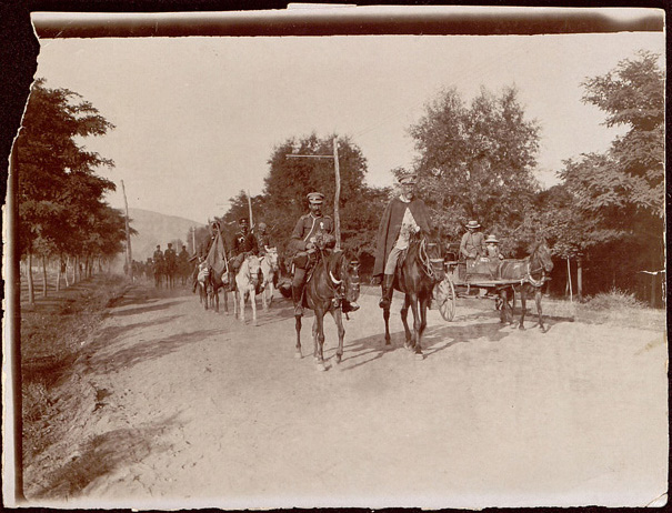 Александър Протогеров води опълченците към фронта, София, 1912 година